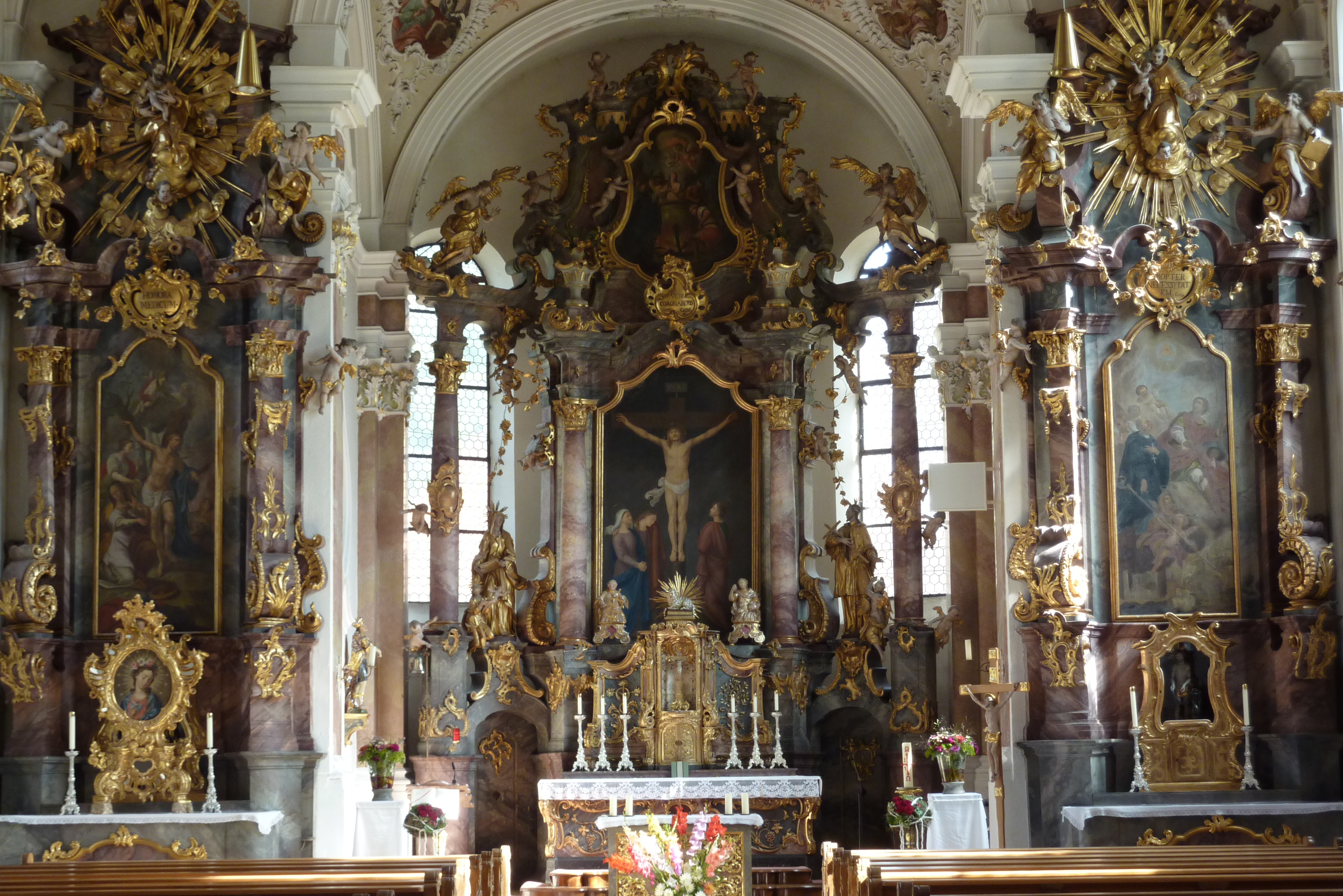 Katholische Pfarrkirche St. Vitus in Donaualtheim (Dillingen an der Donau), Hochaltar und Seitenaltäre